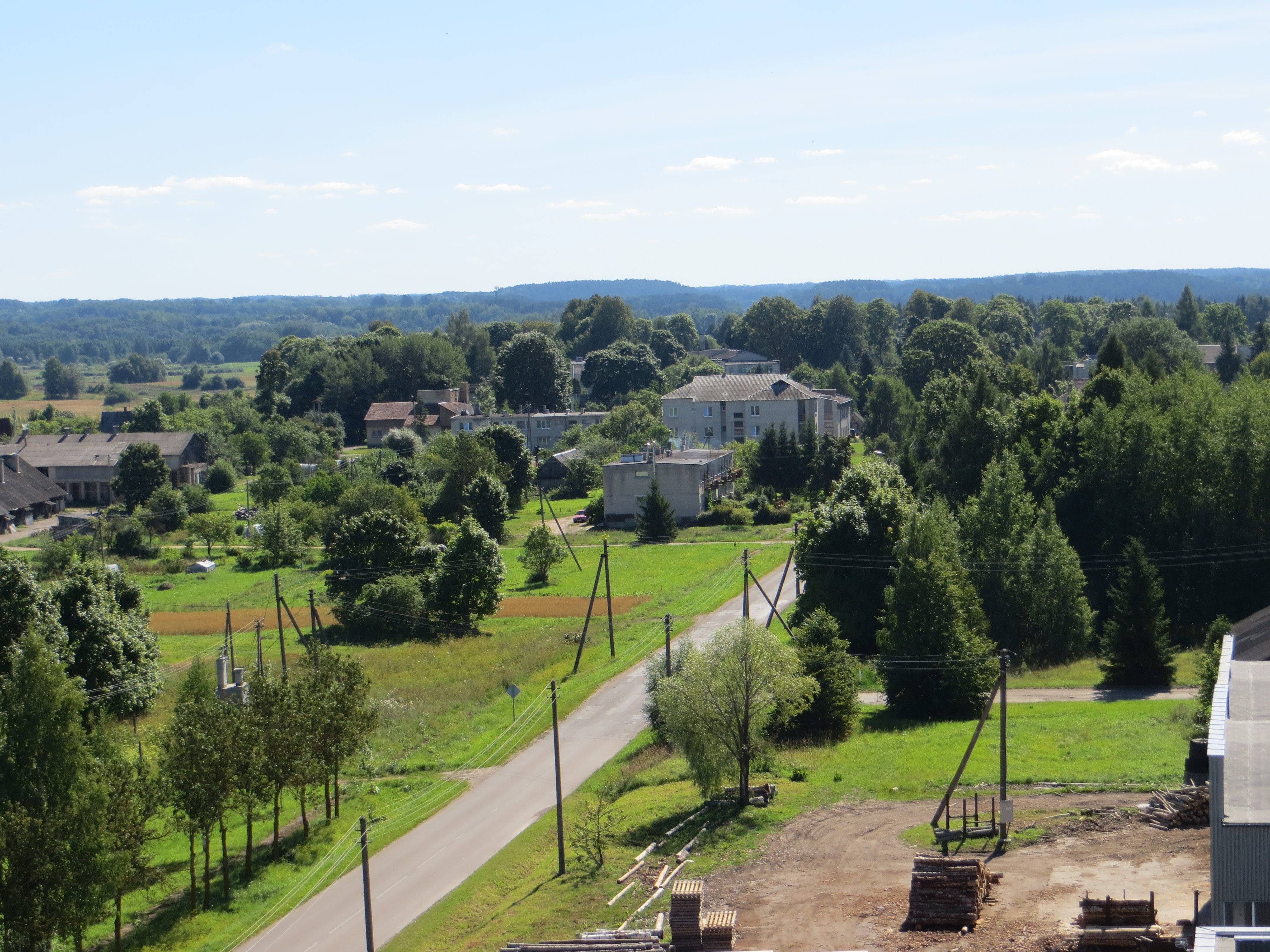 Kriaunos, Lithuania